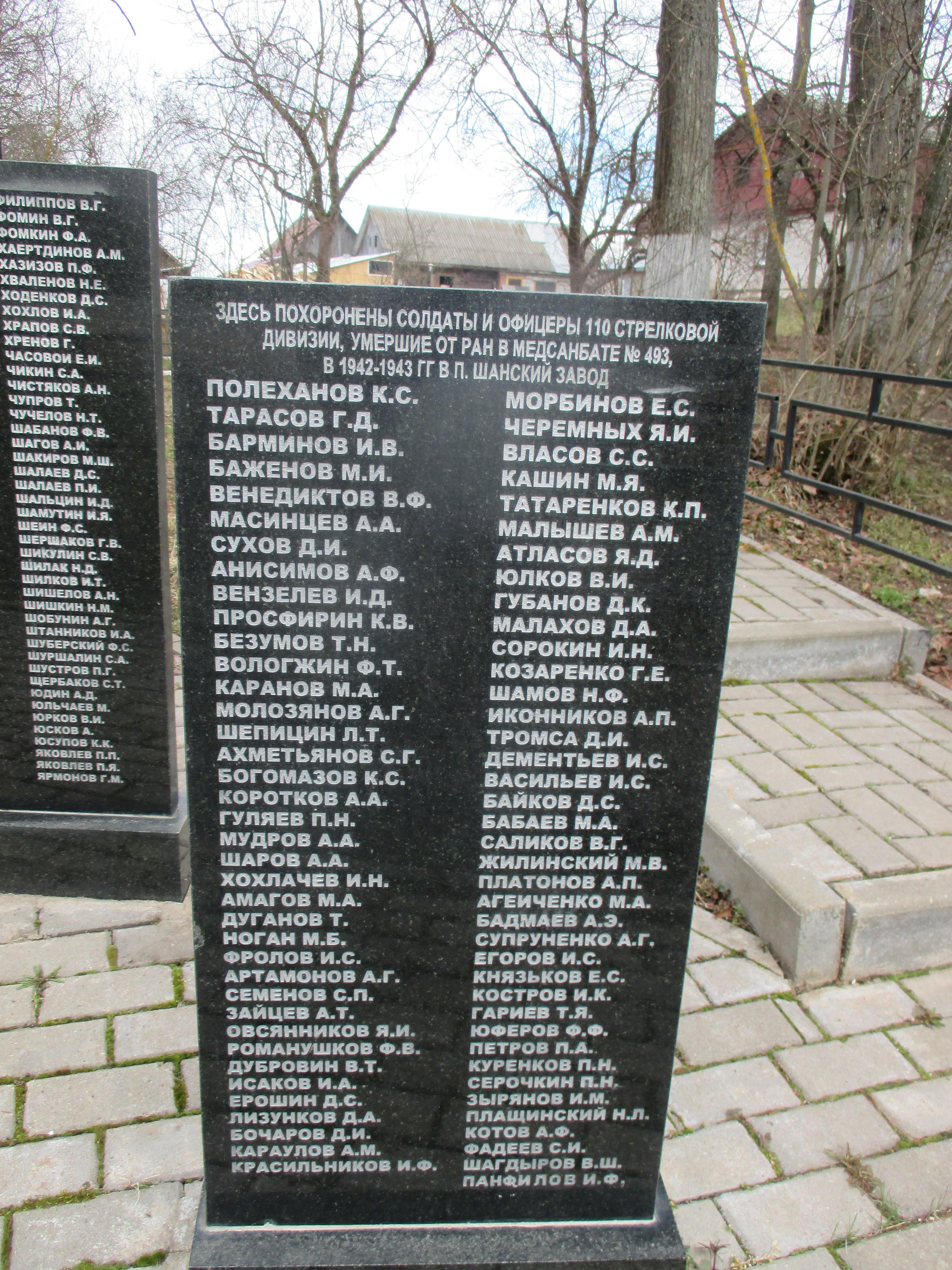 Плита №6, Шанский завод, братская могила у сельской школы